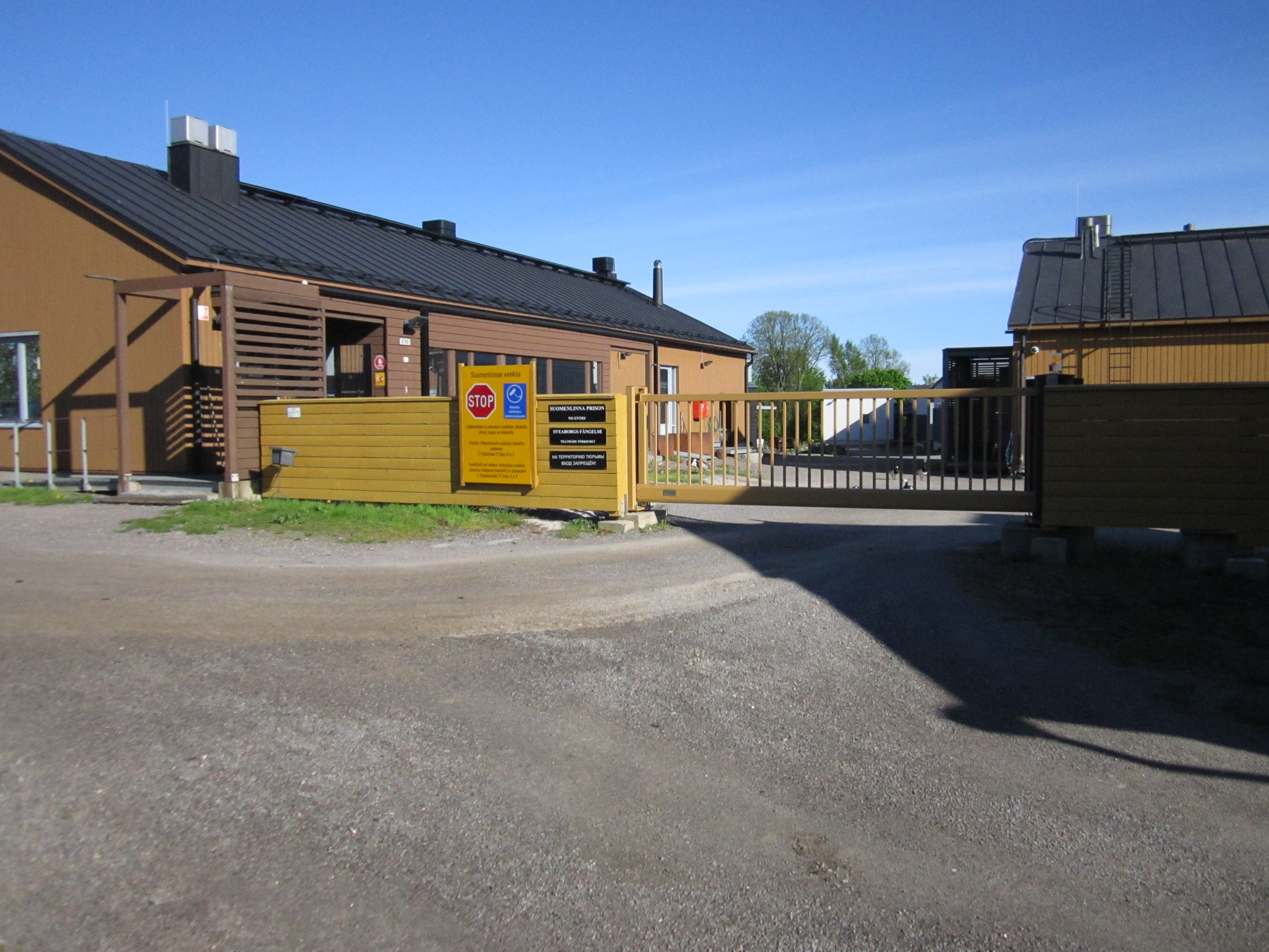 Suomenlinnan vankilan portti